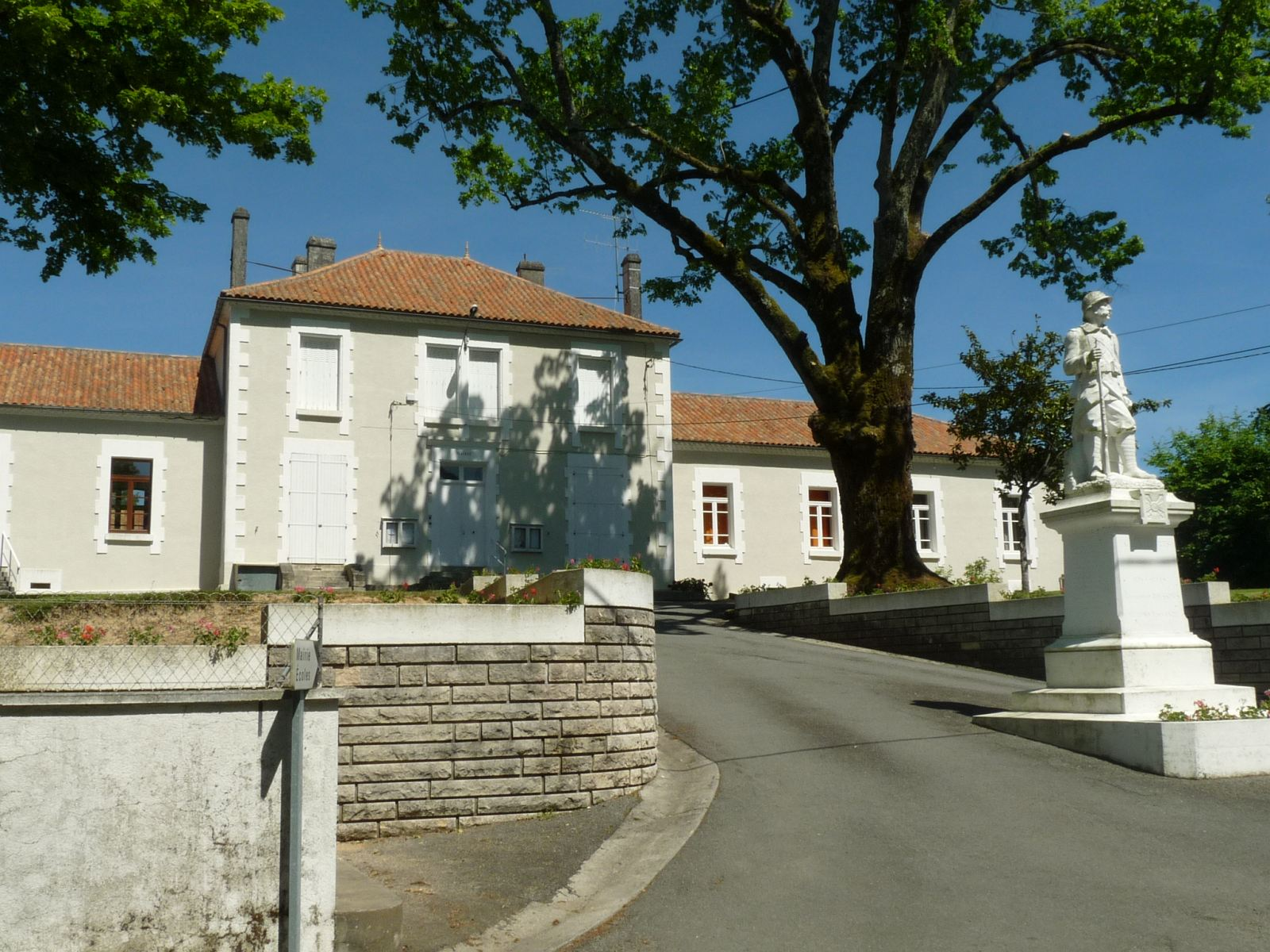 mairie et monument aux morts de Roussines, Charente, France